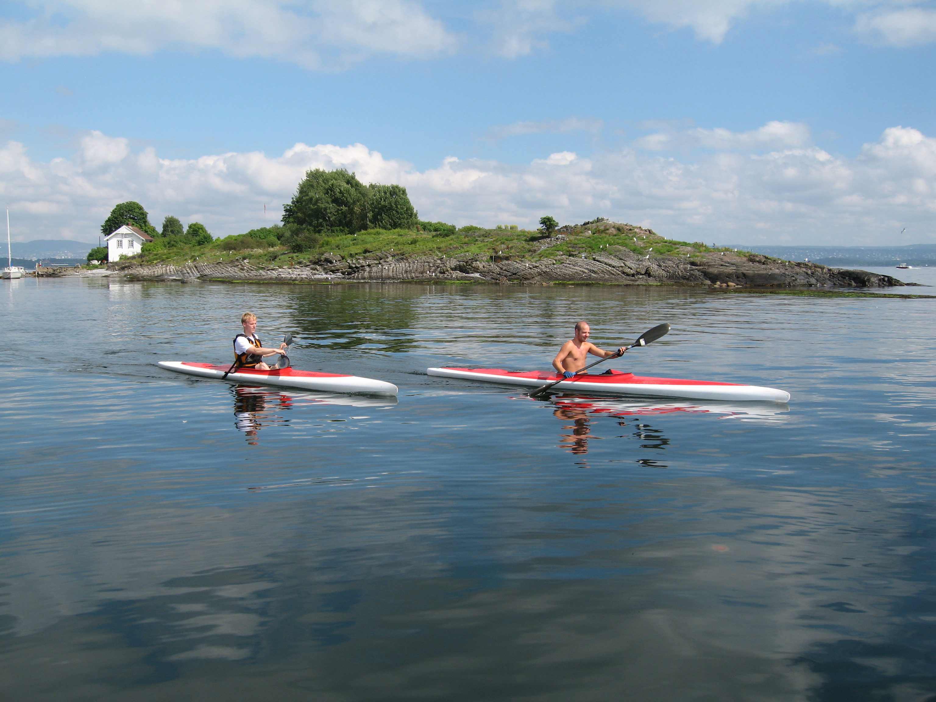 Ytre Vassholmen med padlere, Indre Oslofjord